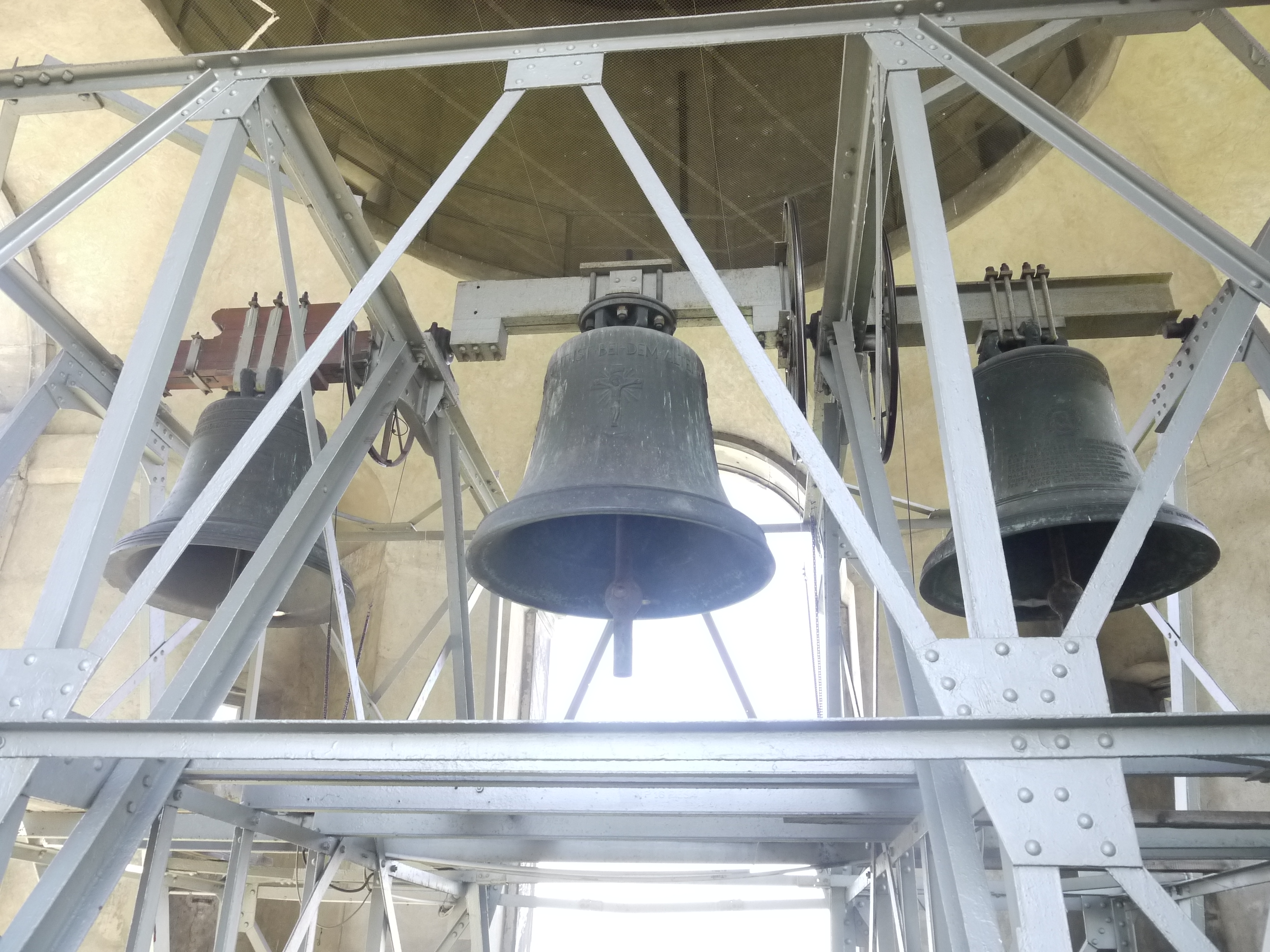 Die Glocken des Berliner Doms in der Nord-West-Kuppel.